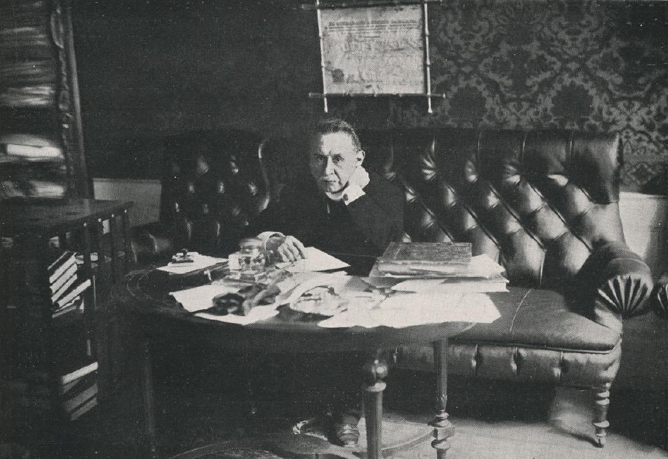 Gonzalo Bulnes Pinto (Santiago, 19 de noviembre de 1851 - Santiago, 17 de agosto de 1936). Historiador, político, agricultor, miembro del Partido Liberal chileno.